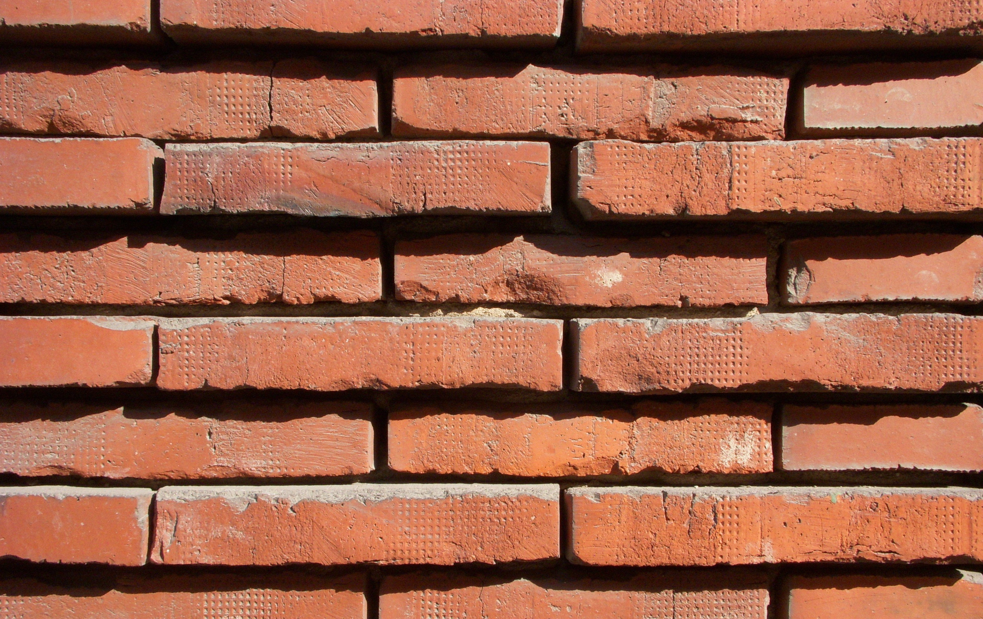 Industricentralen hörnet Gävlegatan/Hudiksvallsgatan, arkitekt Ragnar Östberg, detalj, tegelfasad